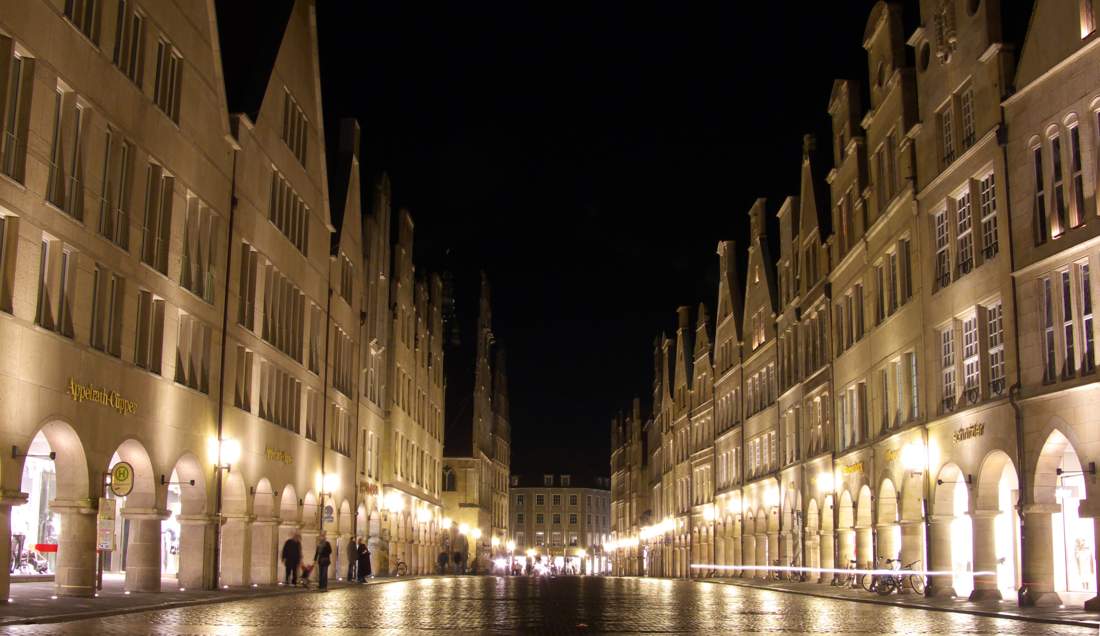 Der Prinzipalmarkt Münster bei Nacht